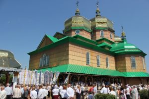 Церква Преображення Господнього (дер.), с. Новиця